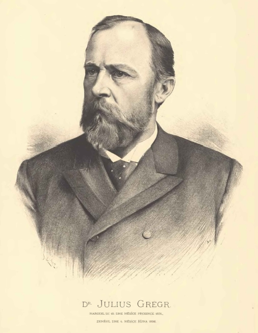 Portréty českých osobností od Jana Vilímka